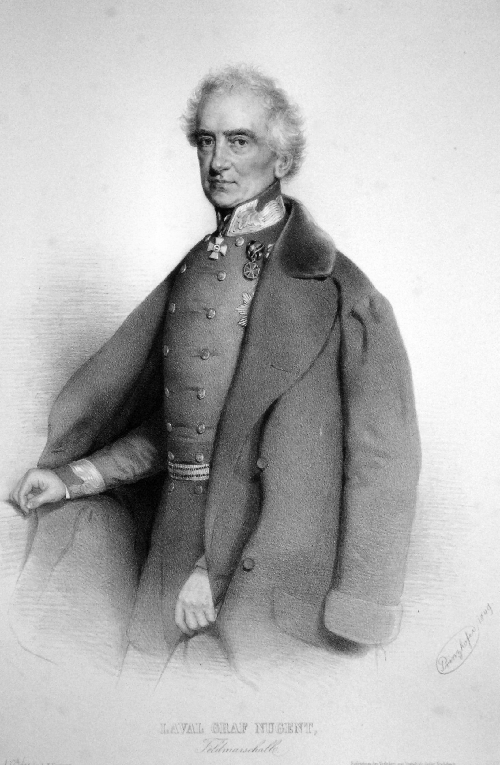 Laval Graf Nugent von Westmeath (1777-1862), österreichischer Feldmarschall. Lithographie von August Prinzhofer, 1844